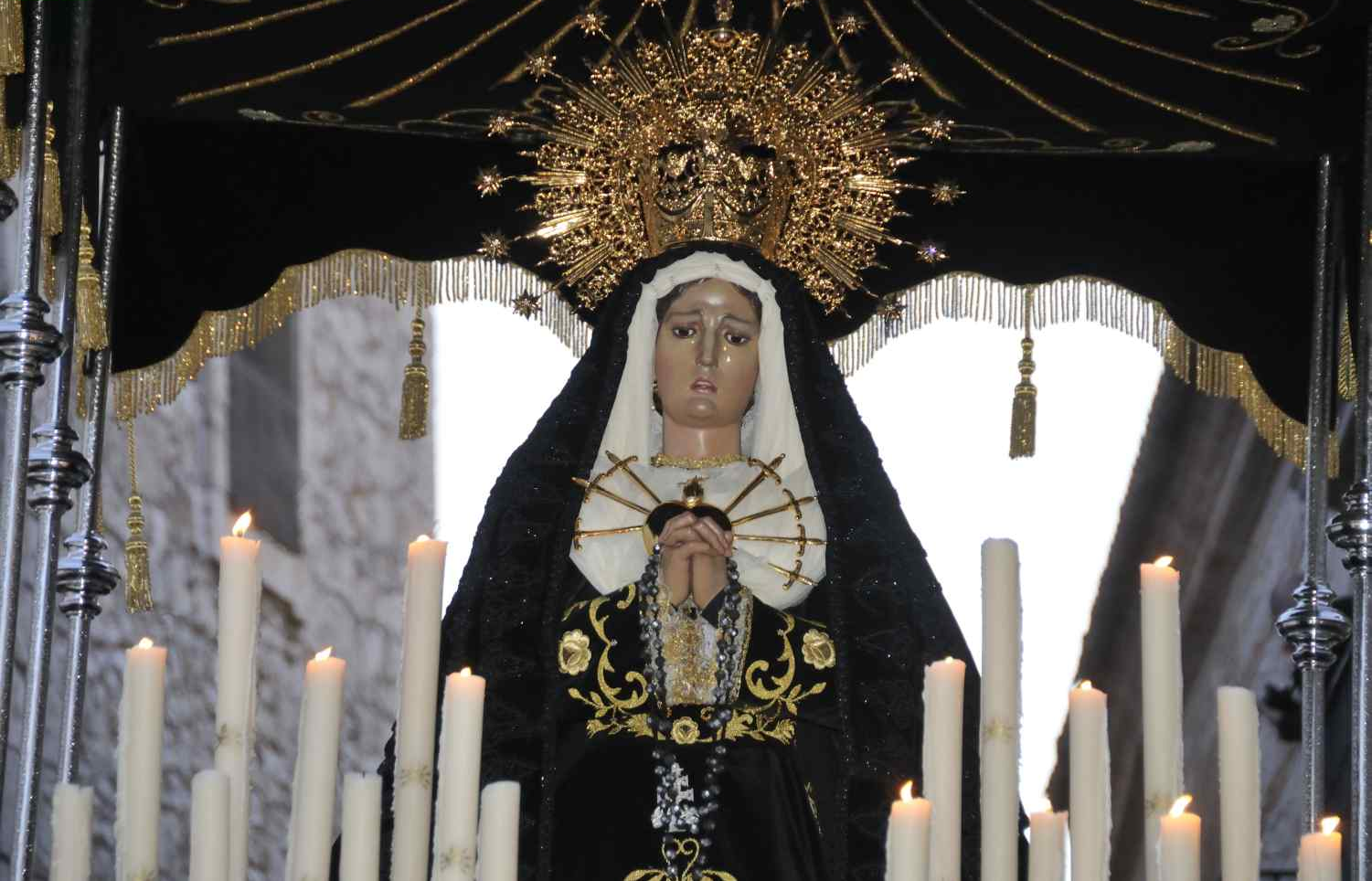 Ntra. Señora de los Dolores de Ocaña (Toledo)